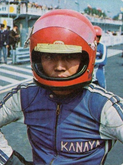 CAMPIONI dello SPORT 1973/74-Figurina n.211- KANAYA - GIAPPONE -MOTOCICLISMO-Rec